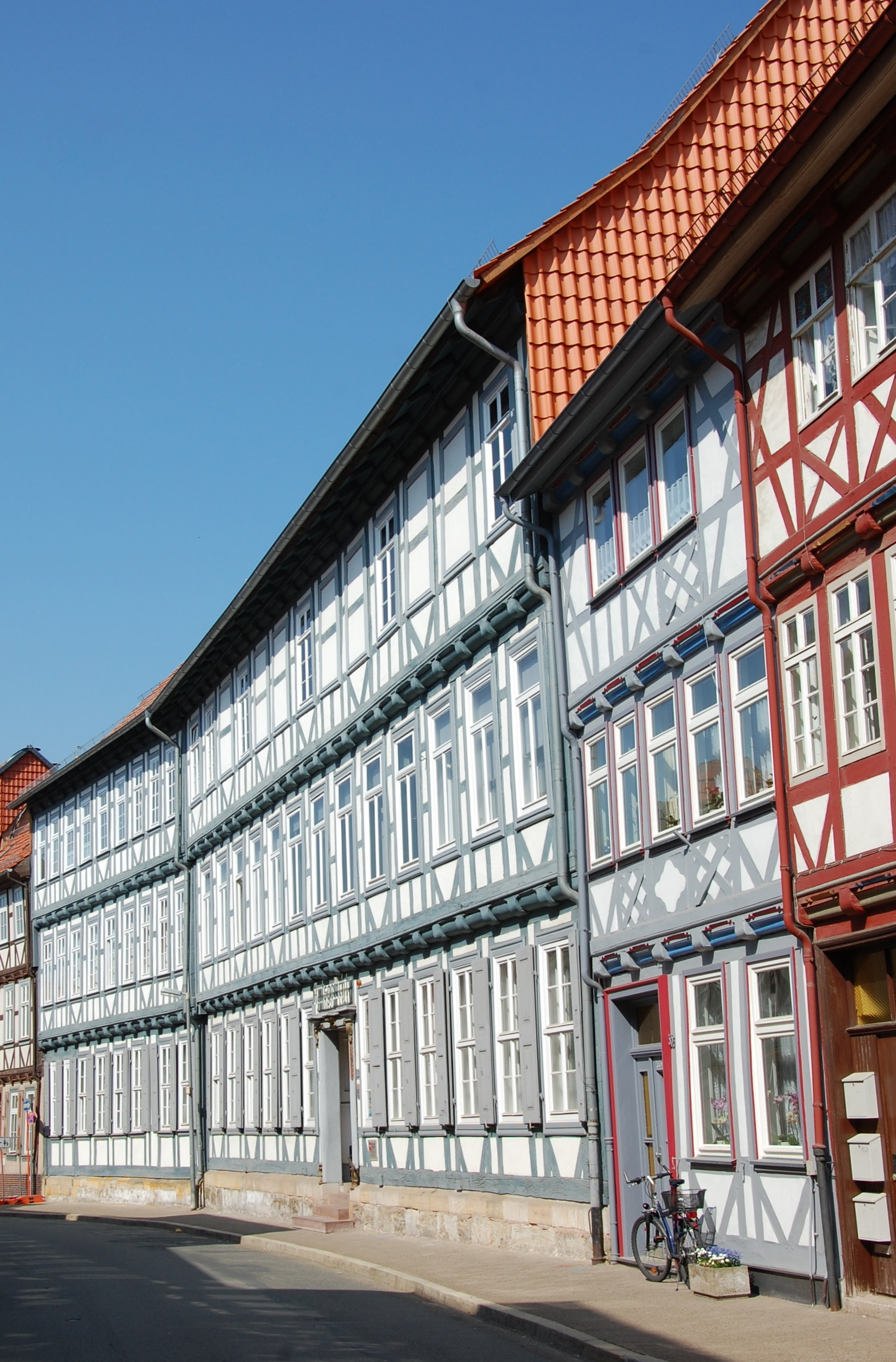 Amtsgericht Duderstadt, Hinterstraße